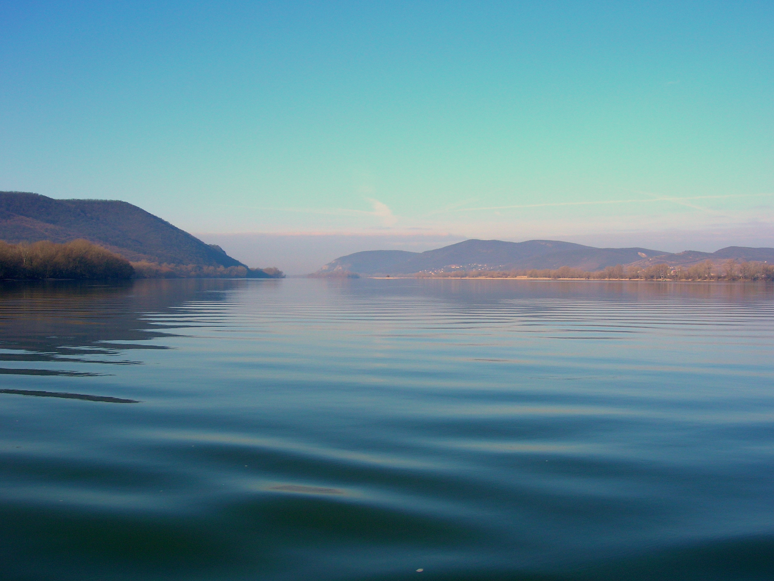 Szob, Ungarn: Blick von der Szober Fähre auf die Donau Richtung Südost. Im Bereich des durch die Berge verengten Donautals lag in der Antike das Kastell Visegrád–Gizellamajor.